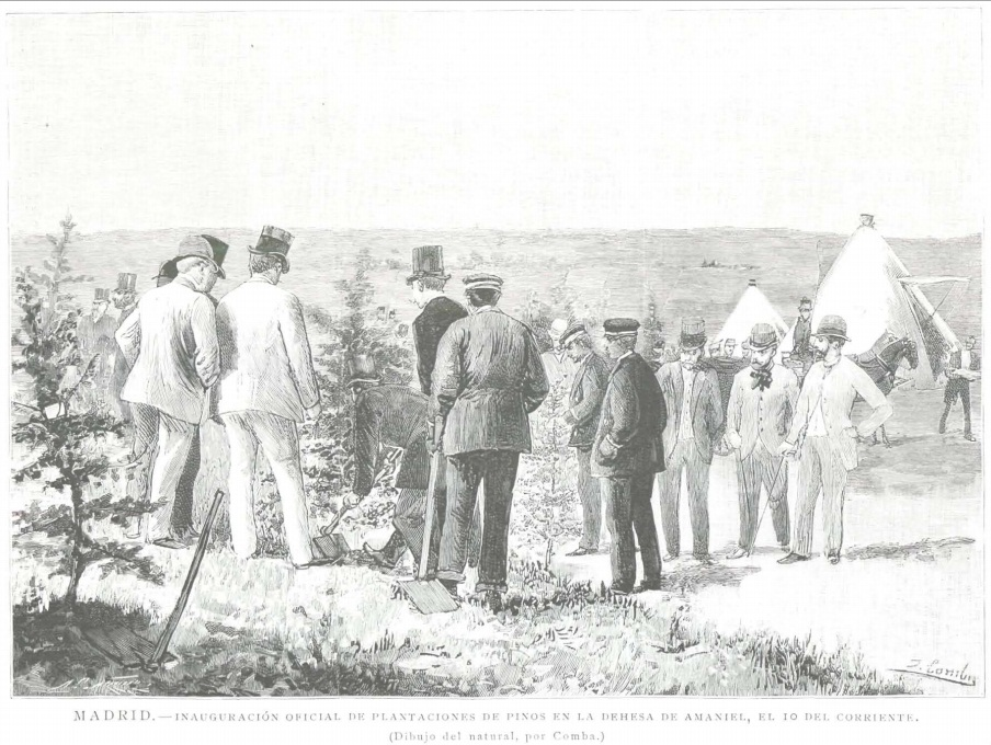 Madrid. Inauguración oficial de plantaciones de pinos en la Dehesa de Amaniel, el 10 del corriente.